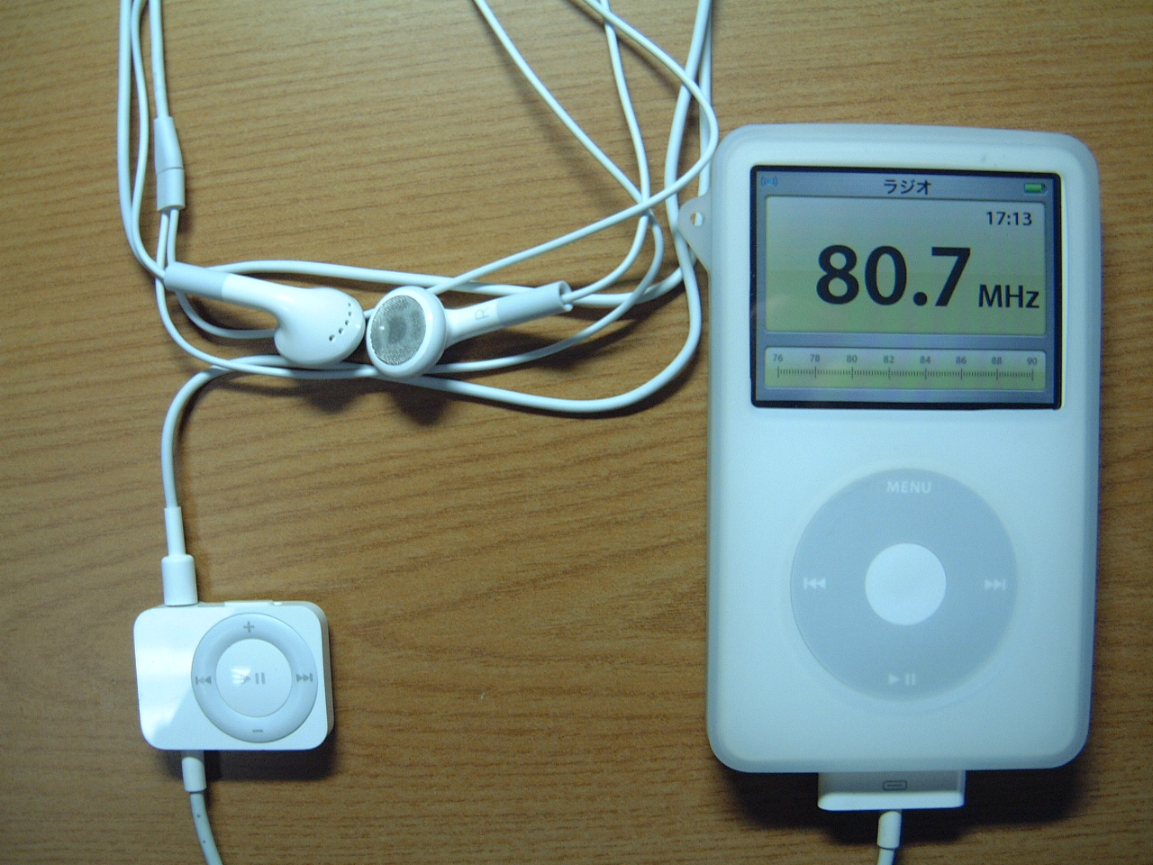 iPod 30GB FMチューナー接続状態